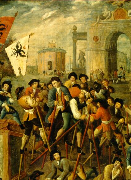 Huile sur toile du XVIIIeme siècle.